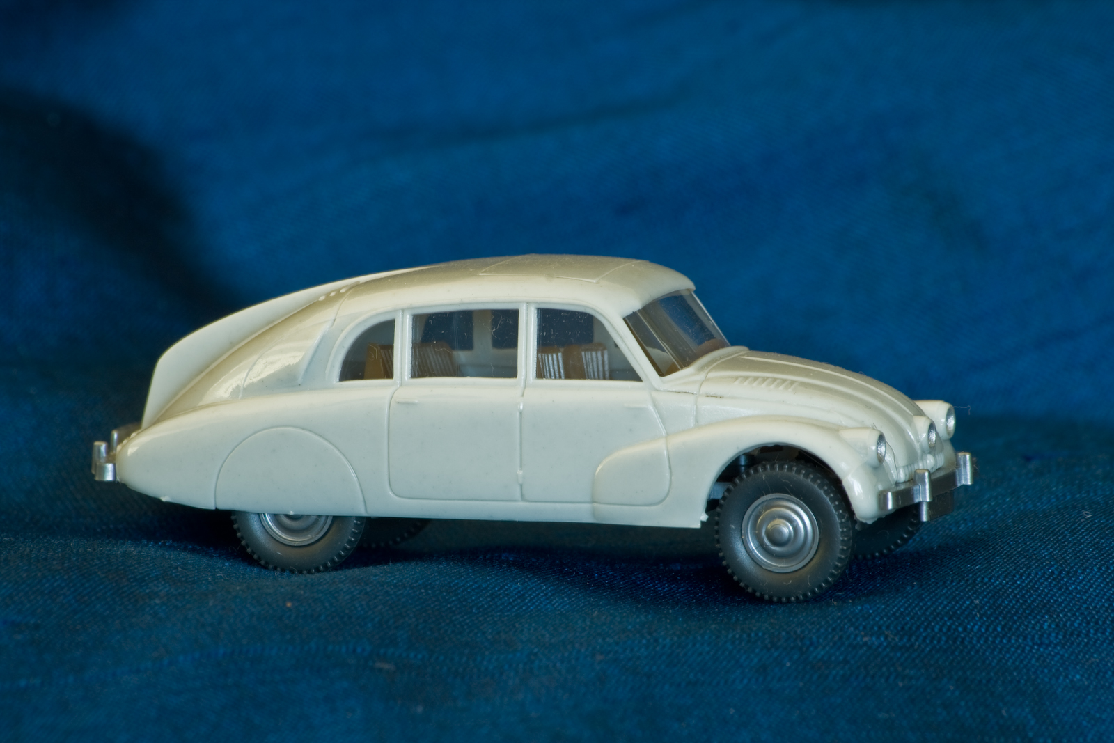 Wiking Modellauto Auto-Typ: Tatra 87 Farbe: grau / hellgrau / helles beige / dunkelweiß / grauweiß